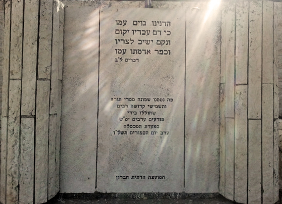 מצבת חלקה בה טמונים שמונה ספרי תורה ותשמישי קדושה שחוללו על ידי ערבים במערת המכפלה בערב יום הכיפורים ה'תשל"ו. המצבה נמצאת בבית העלמין העתיק בחברון.